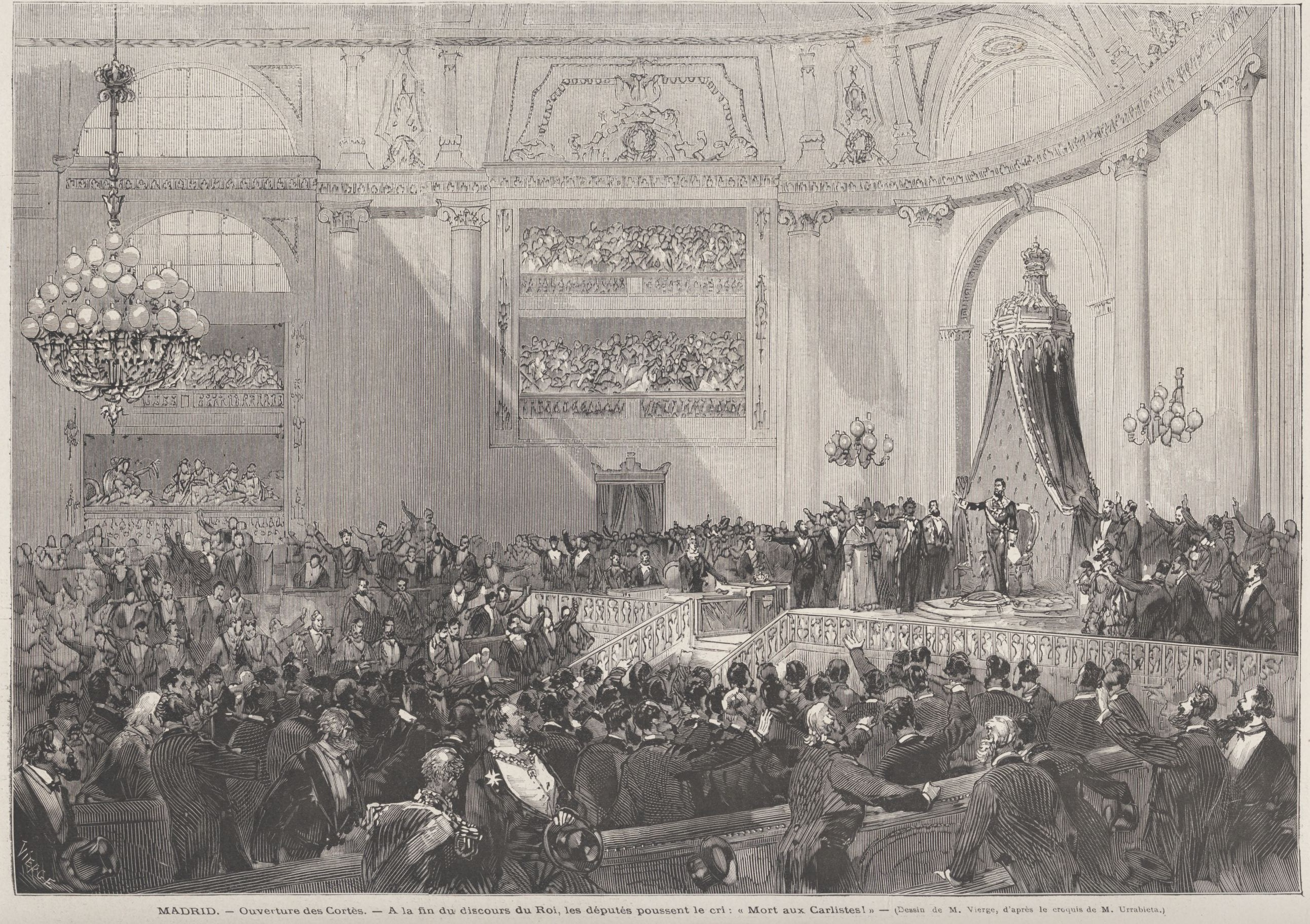 Madrid.— Ouverture des Cortès.— A la fin du discours du Roi, les députés poussent le cri: «Mort aux carlistes» — (Dessin de M. Vierge, d'après le croquis de M. Urrabieta), Le Monde Illustré.